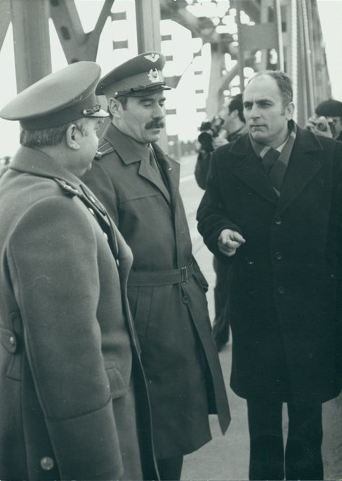 Посещението на първият български космонавт Георги Иванов на Моста на дружбата (Дунав мост)- Русе. Вдясно - Ал. Александров, зав. Отдел пропаганда и агитация; вляво - Атанас Гагов, зав. Отдел Военно административен на ОК на БКП – Русе.